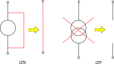 Thevenova věta - odpojování zdrojů při výpočtu